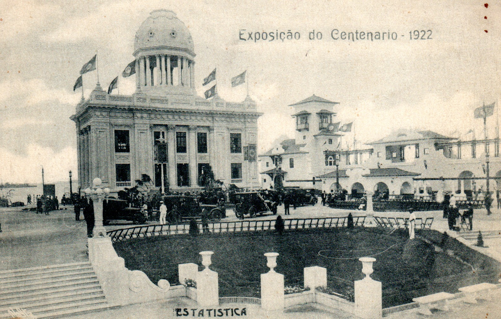 Brasil. Exposición Centenario 1922